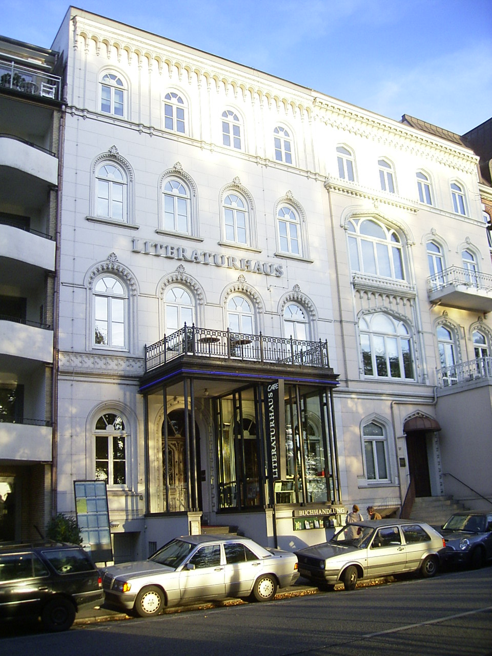 Der Bau Schwanenwik 38 auf der Uhlenhorst wurde 1867/68 nach Plänen von Jean-David Jollasse erbaut. Nach diversen unterschiedlichen Nutzngen wurde es 1988/89 durch das Architekturbüro Schramm, v. Bassewitz, Hupertz & Partner restauriert und dient seither dem Literaturhaus Hamburg als Heimstatt.